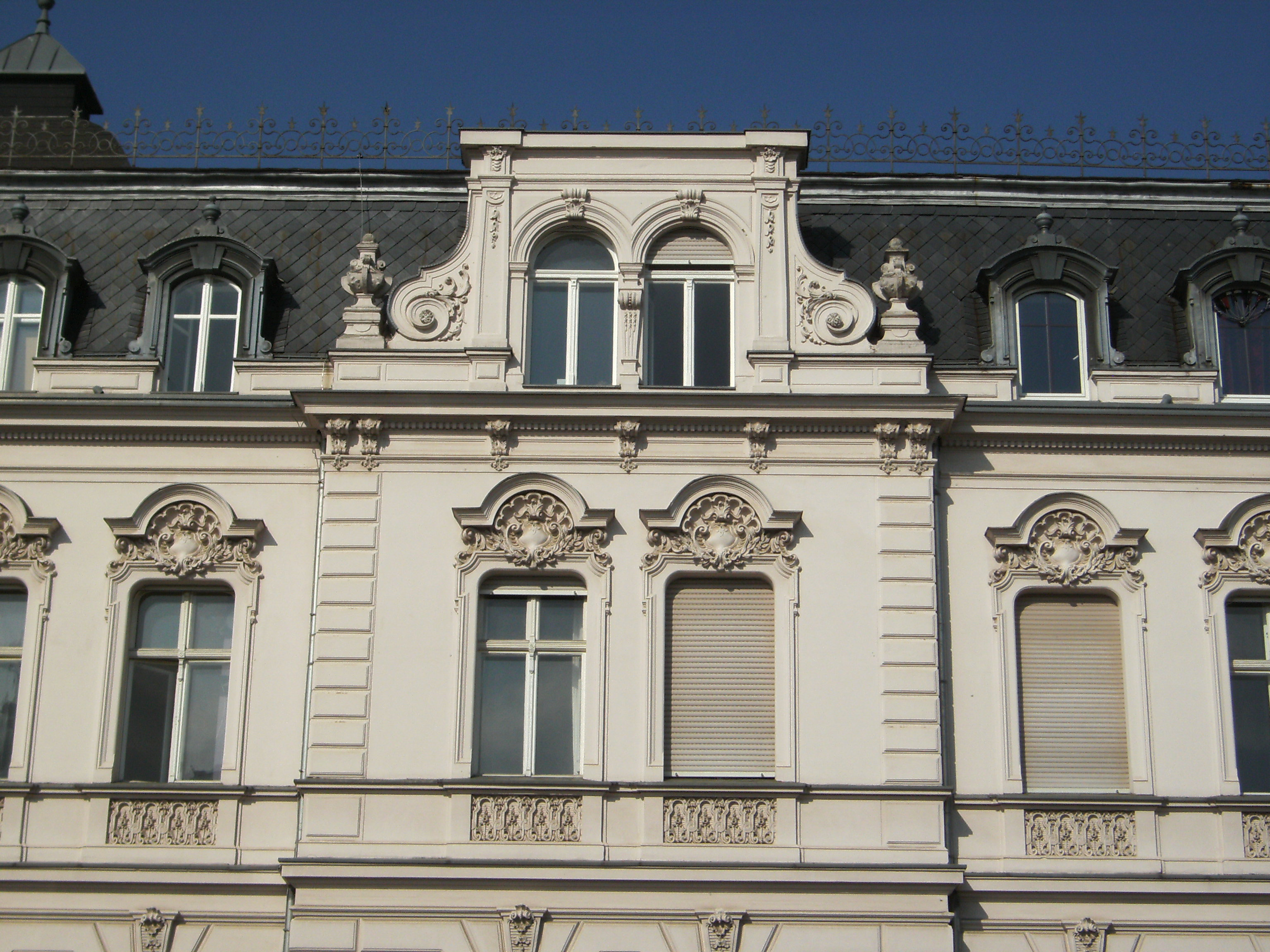 Schillerstraße 55 ,1